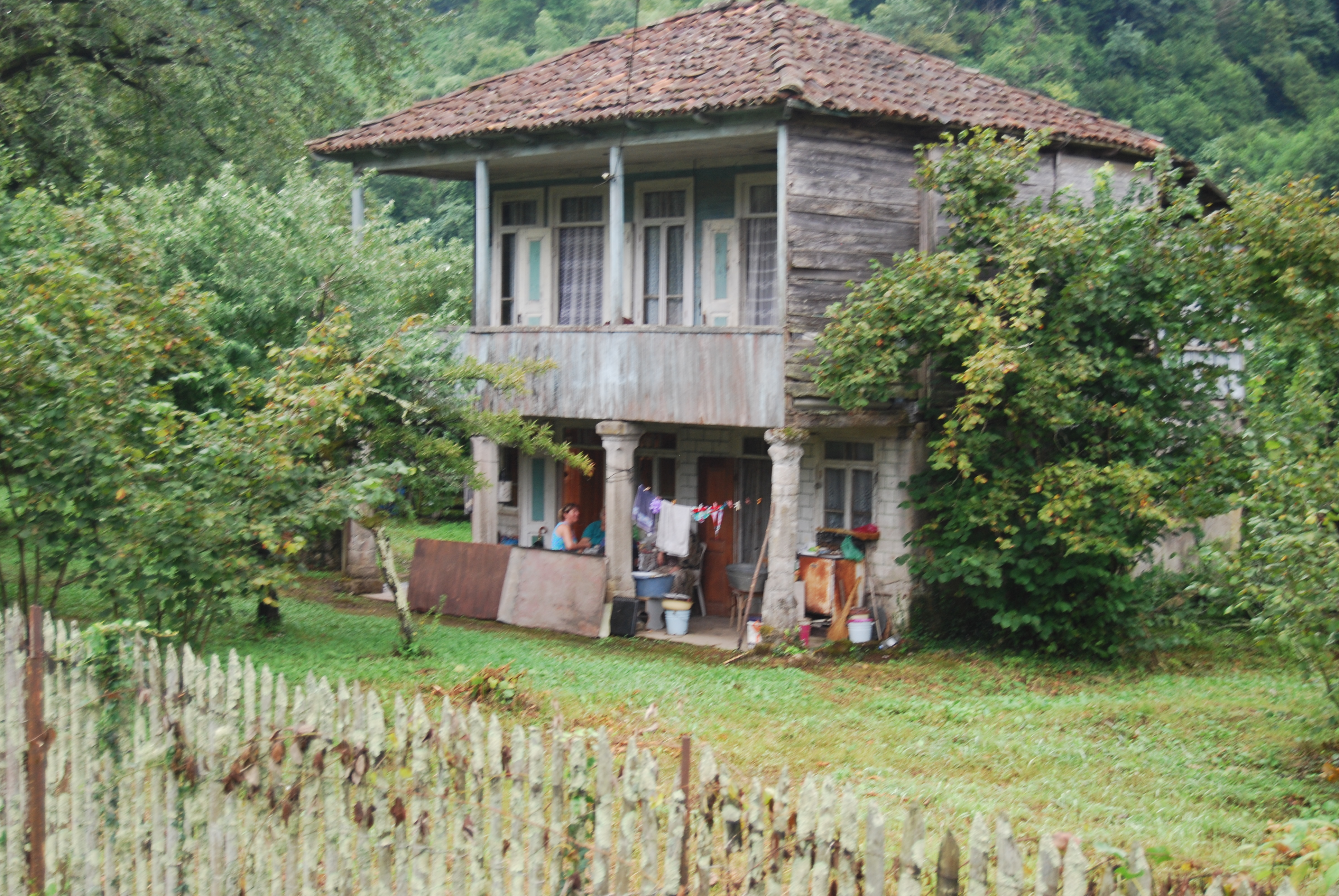 გურული ოდა-სახლი